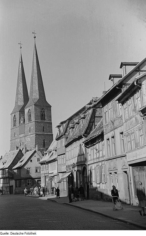 Original image description from the Deutsche Fotothek Ansicht der Pölkenstraße, im Hintergrund die Nikolaikirche